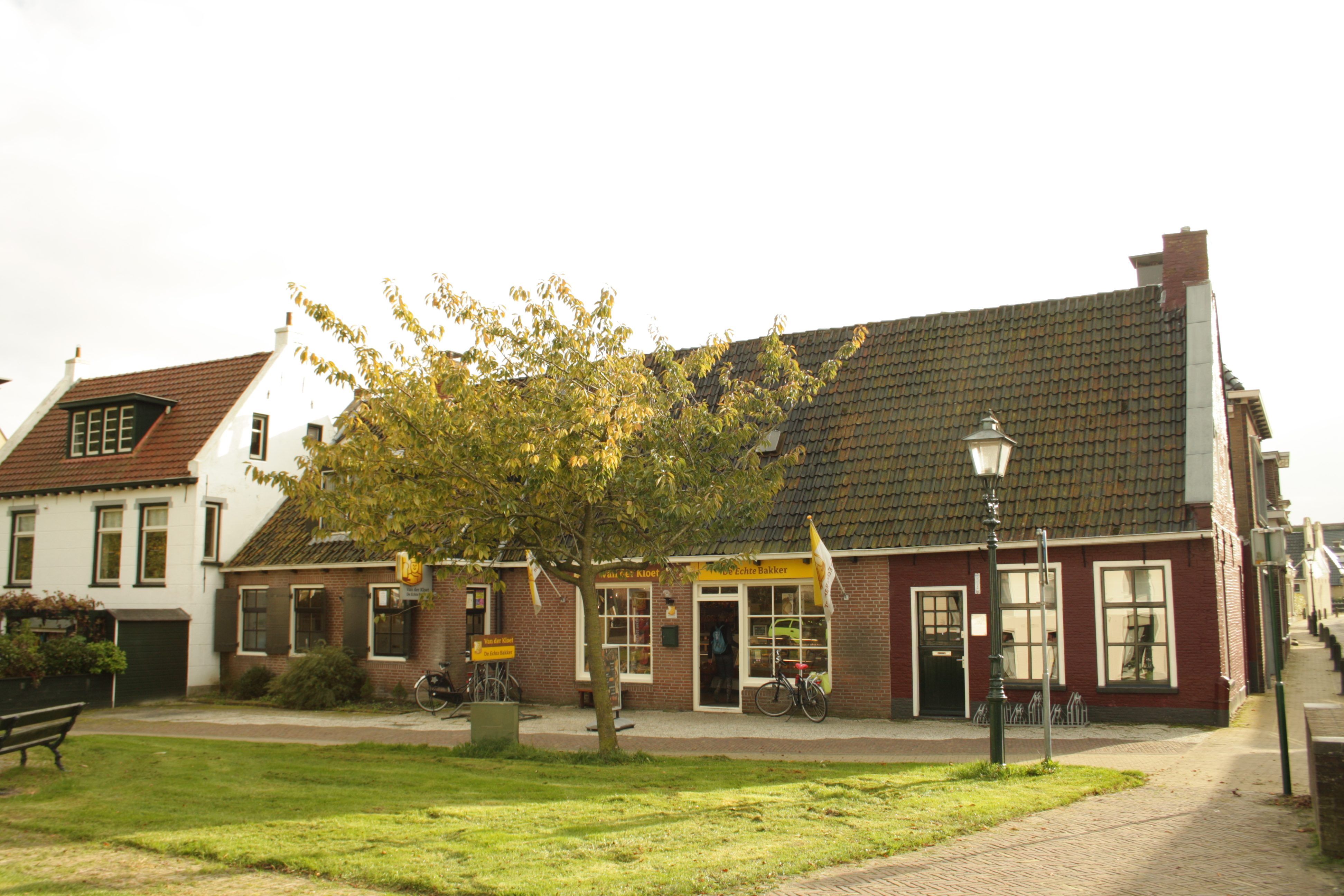 Brêgebuorren 21 te Dronrijp